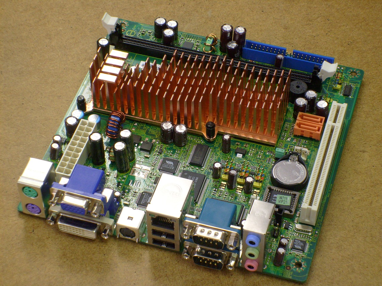 Mini-ITX Board MSI MS-7199 mit Via C7 1GHz-Prozessor und passiver Kühlung